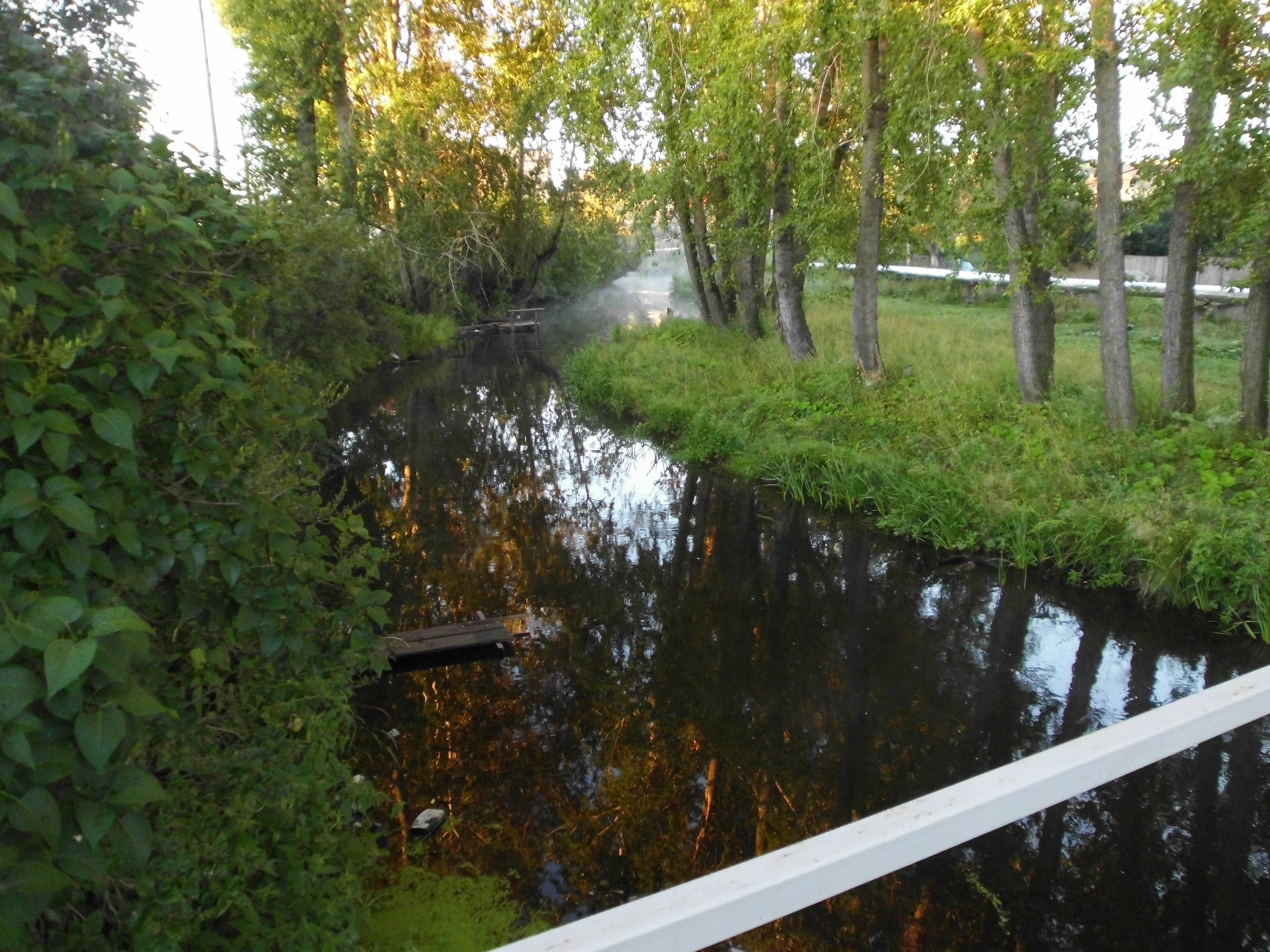 Река Уфалейка (Уфалей) выше места впадения реки Генералки, ниже Верхнеуфалейского пруда. Вид вниз по течению с пешеходного мостика между ул. Хохрякова и пер. Речным. Город Верхний Уфалей.